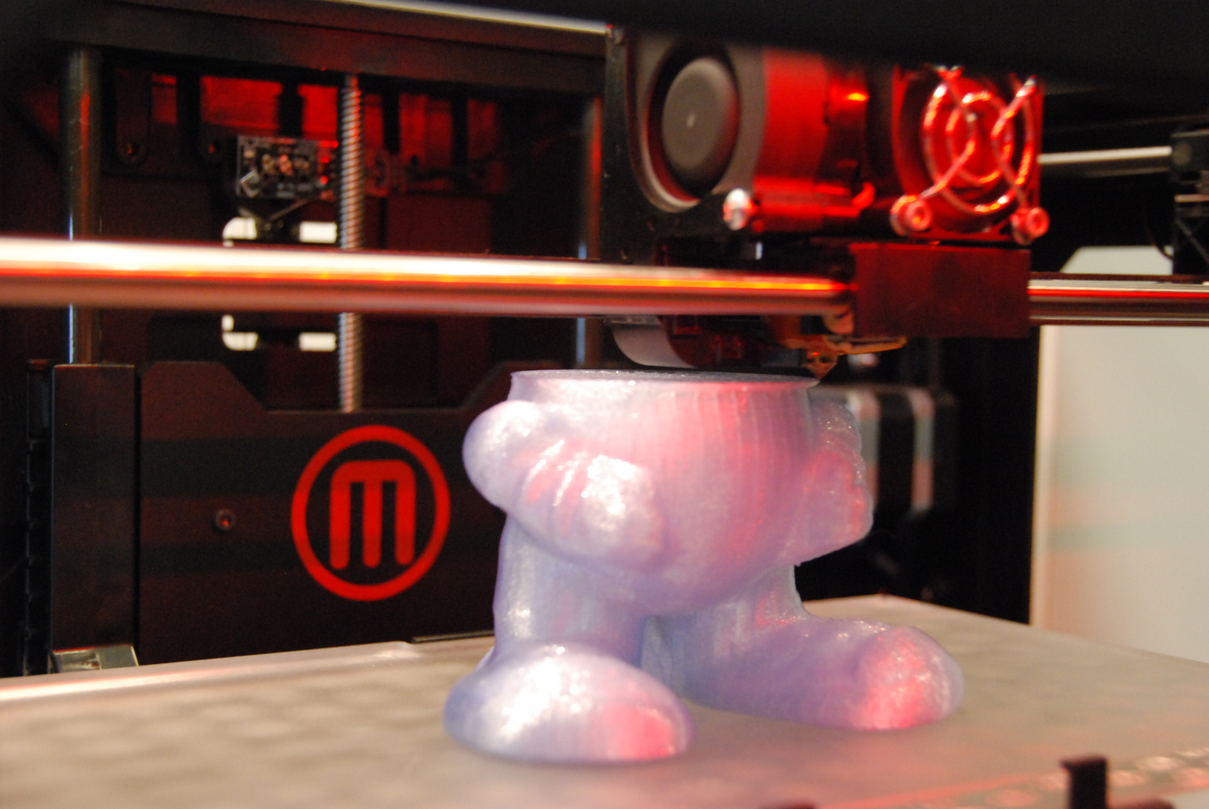 Makerbot Store, Manhattan (NY, USA)